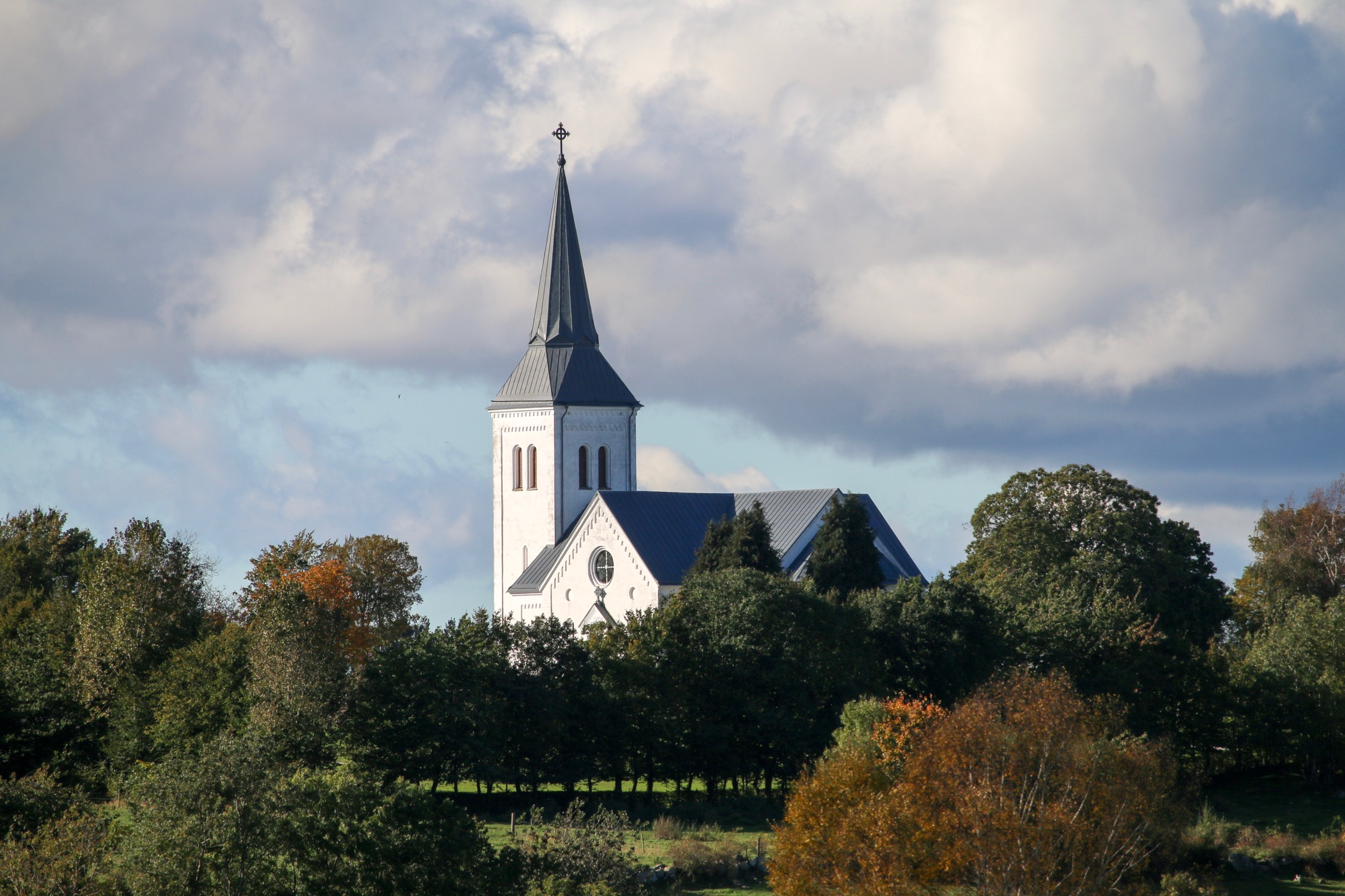 Södra Mellby kyrka